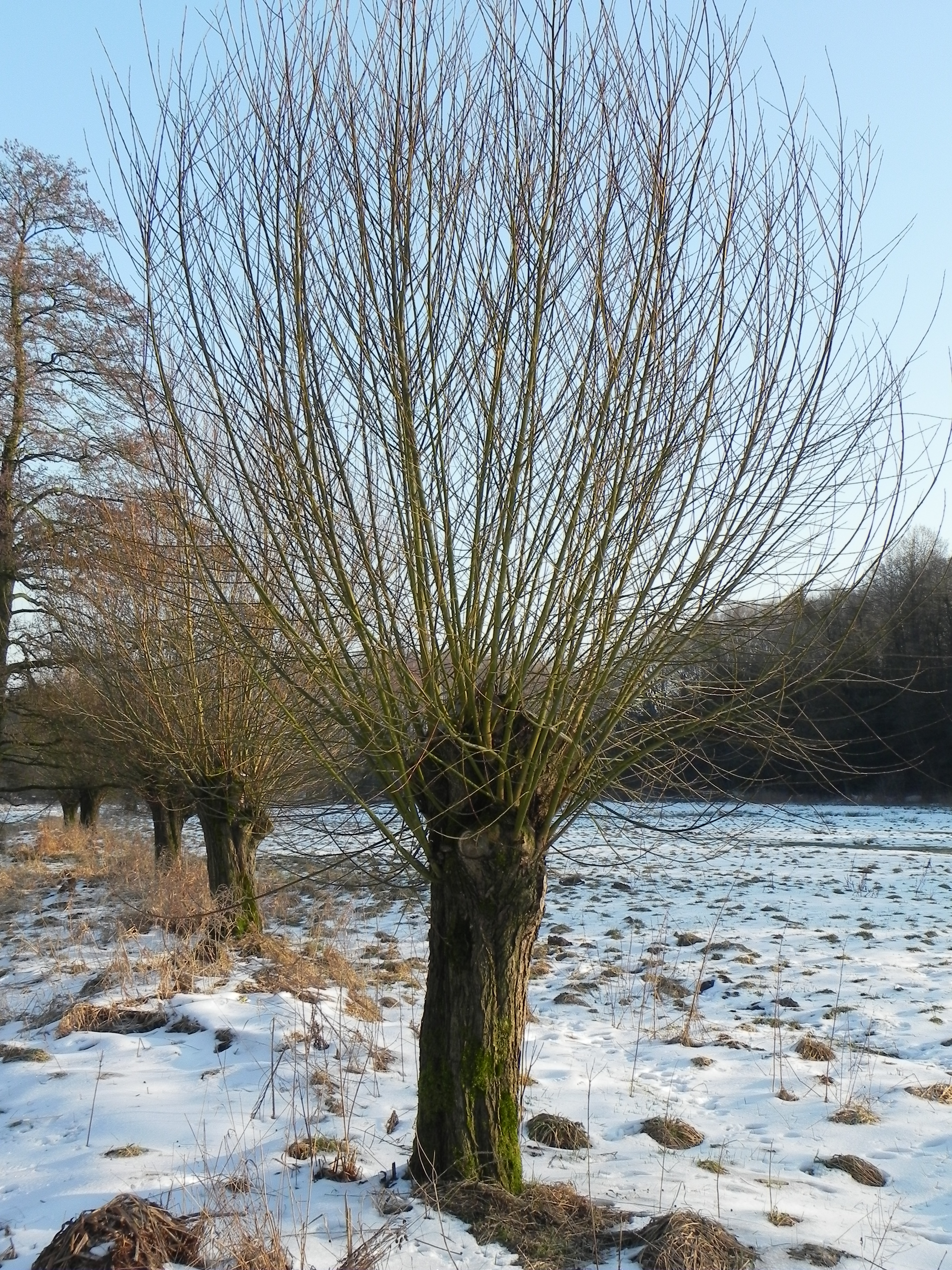 Kopfweide mit jungen Trieben, an der Brunau bei Bonstorf, im Naturpark Südheide